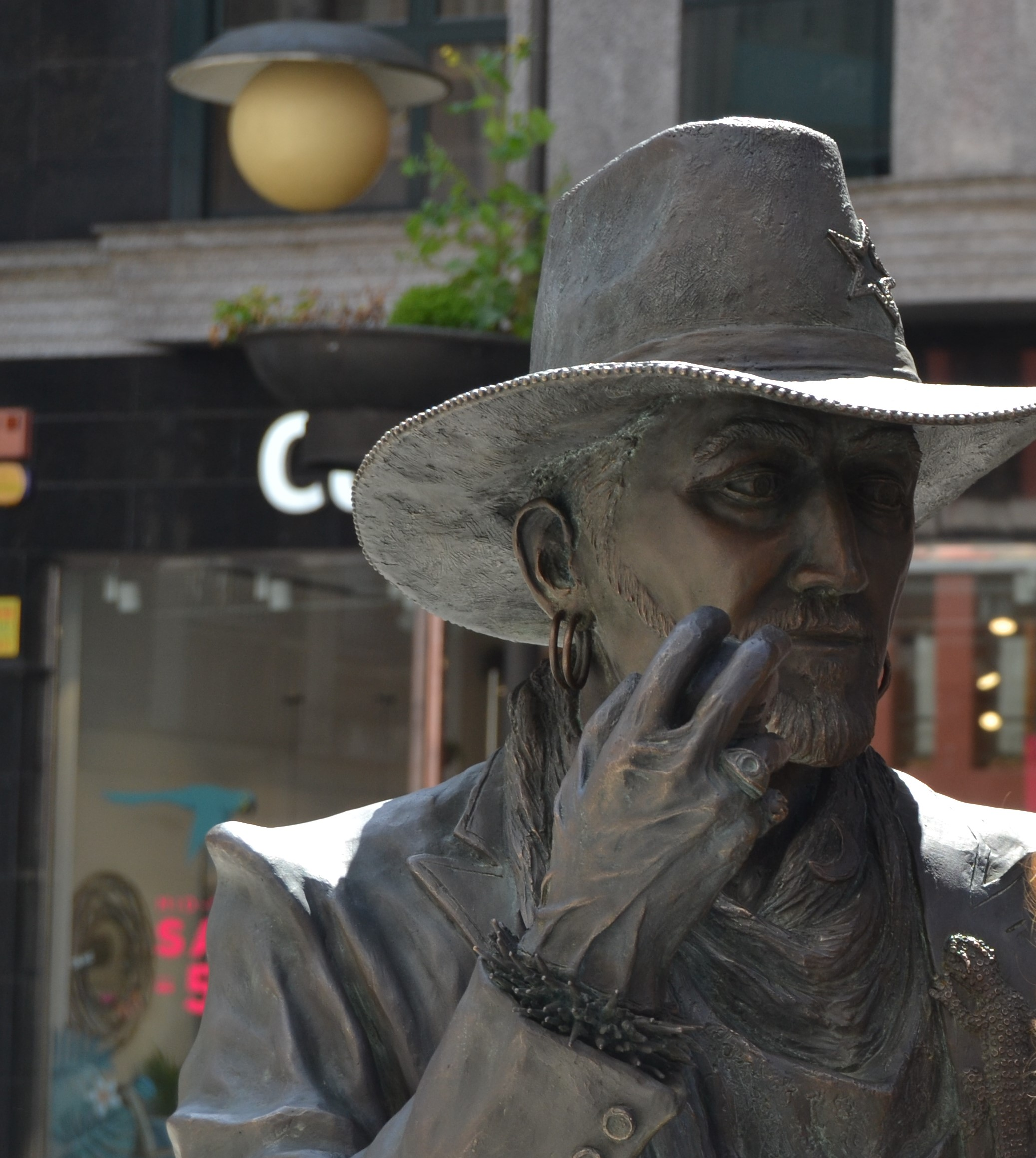 Estatua en bronce homenaje a "Tino Casal", inaugurada el 12 de abril de 2019. Obra del escultor Anselmo Iglesias Poli.